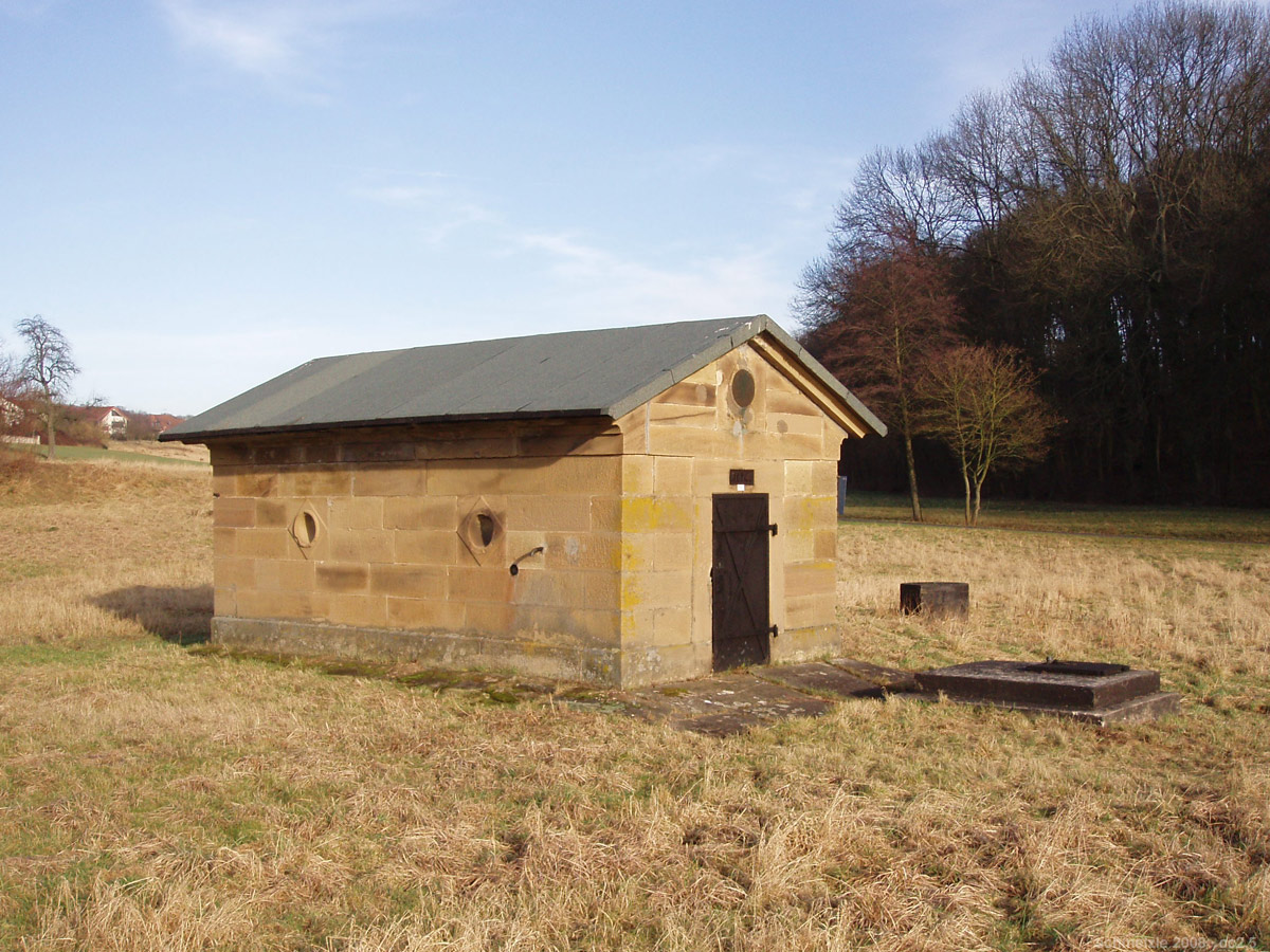 Hartlesbrunnen in Heilbronn-Biberach, Brunnenhaus erbaut 1874 zur Wasserversorgung von Heilbronn